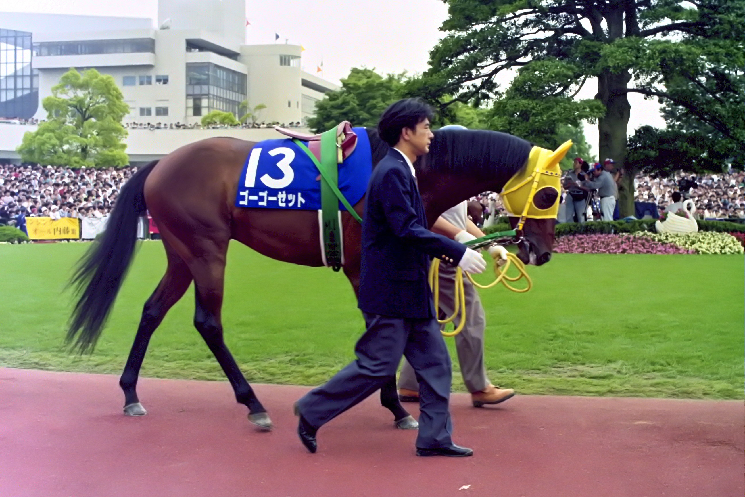 ゴーゴーゼット 1995年6月4日 京都競馬場